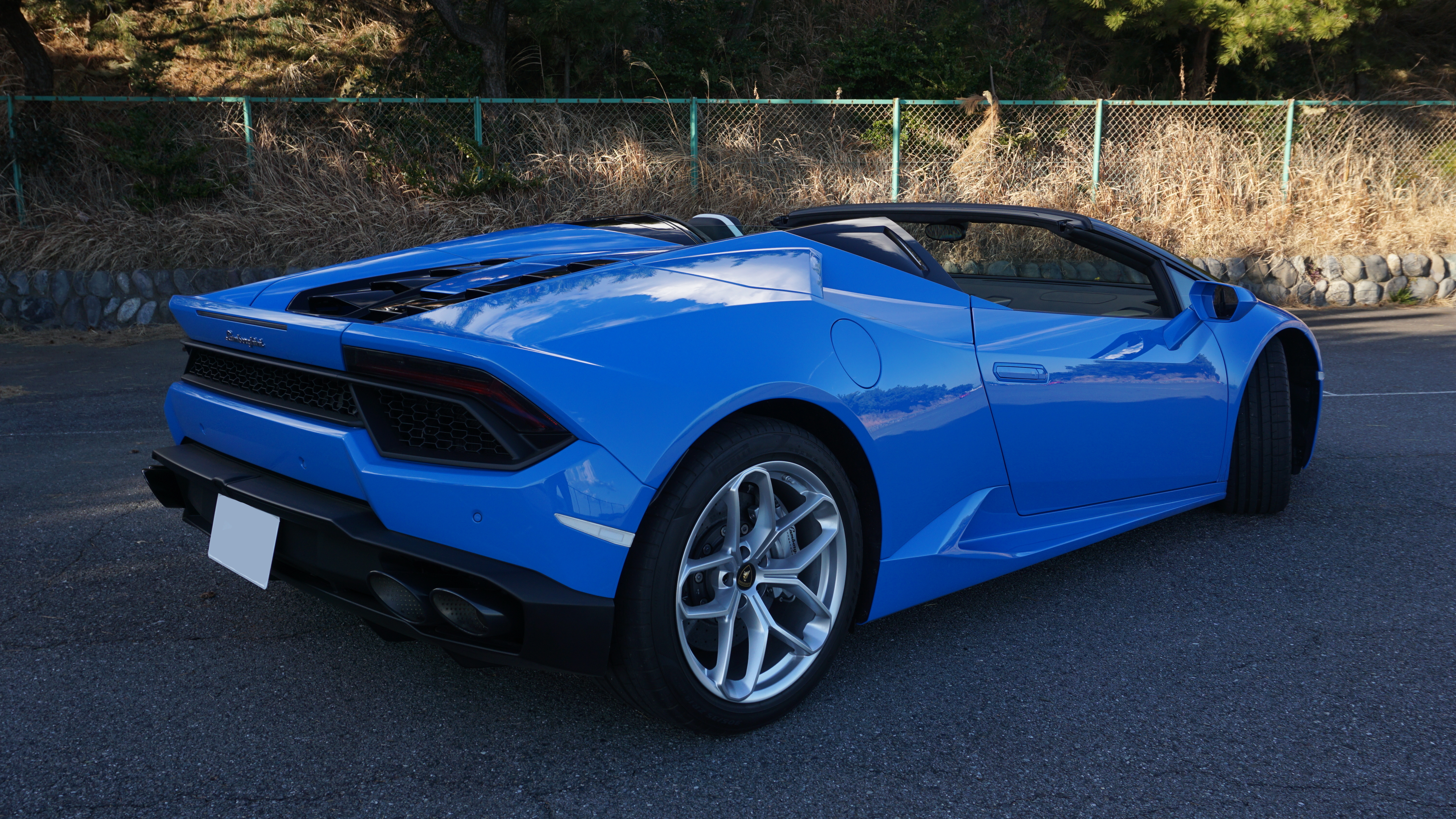 ルーフを開けた状態のLamborghini Huracán LP 580-2 RWD Spyderリア部分。